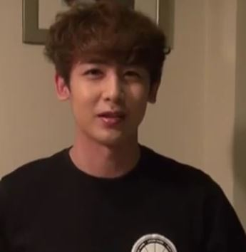 Korean Movie 기적의 피아노 The Piano, 2015 닉쿤의 응원 영상 Cheering Video